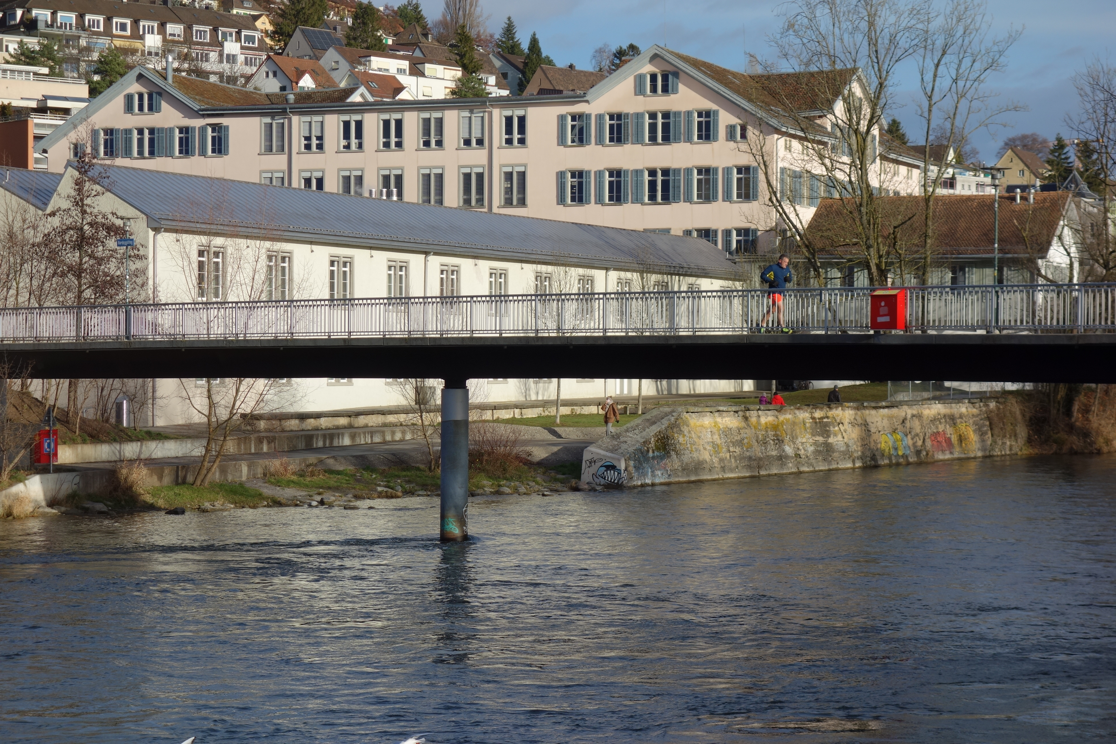 ehemalige Seidenweberei Baumann älter, Zürich-Höngg ZH, Schweiz